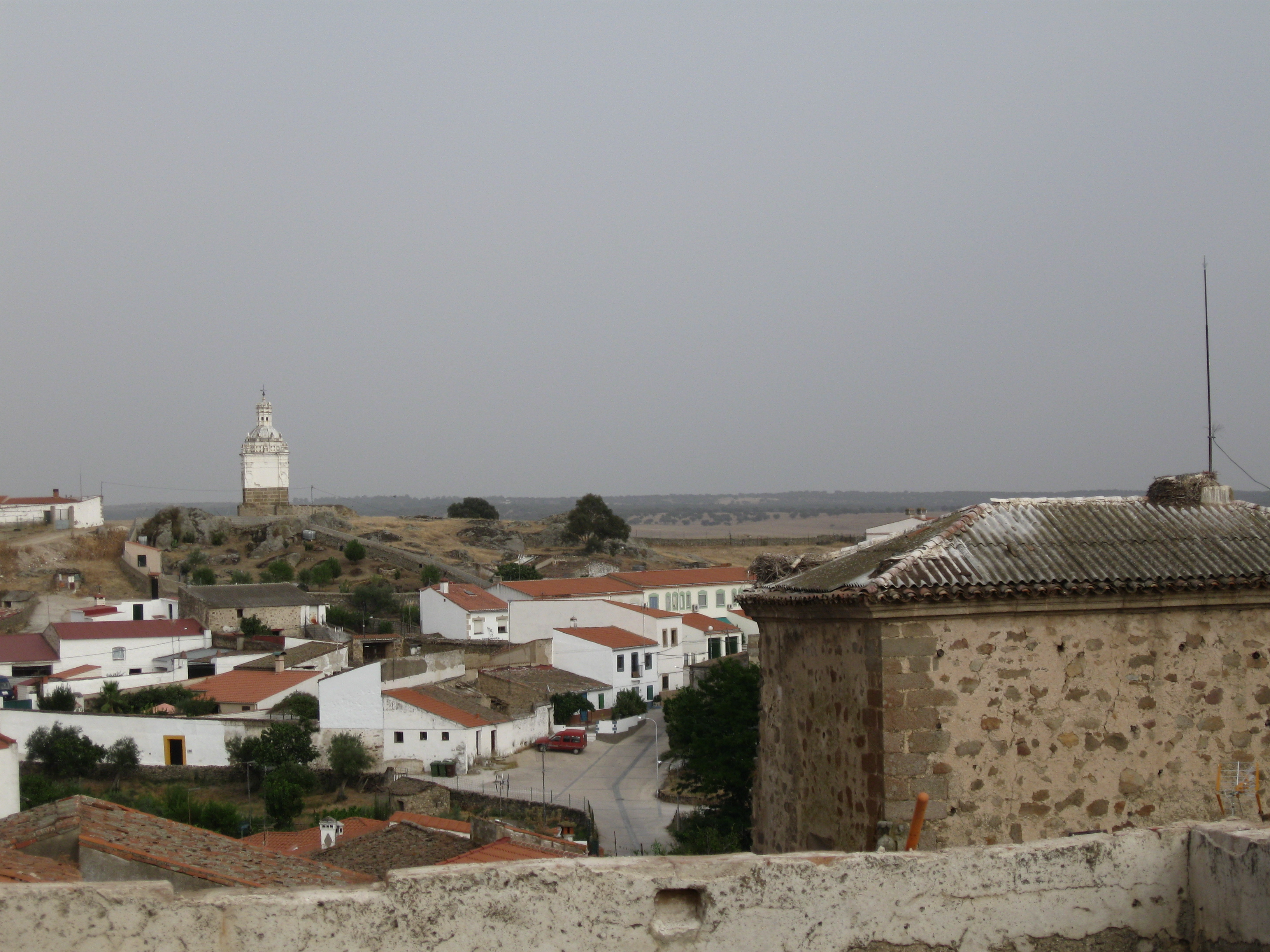 Vista general del barrio del Humilladero, en Brozas, provincia de Cáceres, España. Al fondo a la izquierda se puede ver la ermita del Humilladero en lo alto del barrio. A la derecha de la imagen, la torre del convento de la Encarnación.